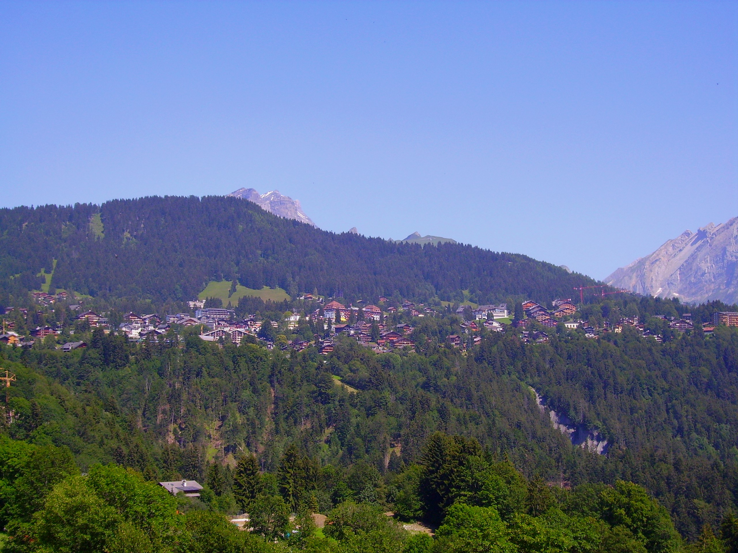 Panorama du village de Villars-sur-Ollon dans le canton de Vaud en Suisse